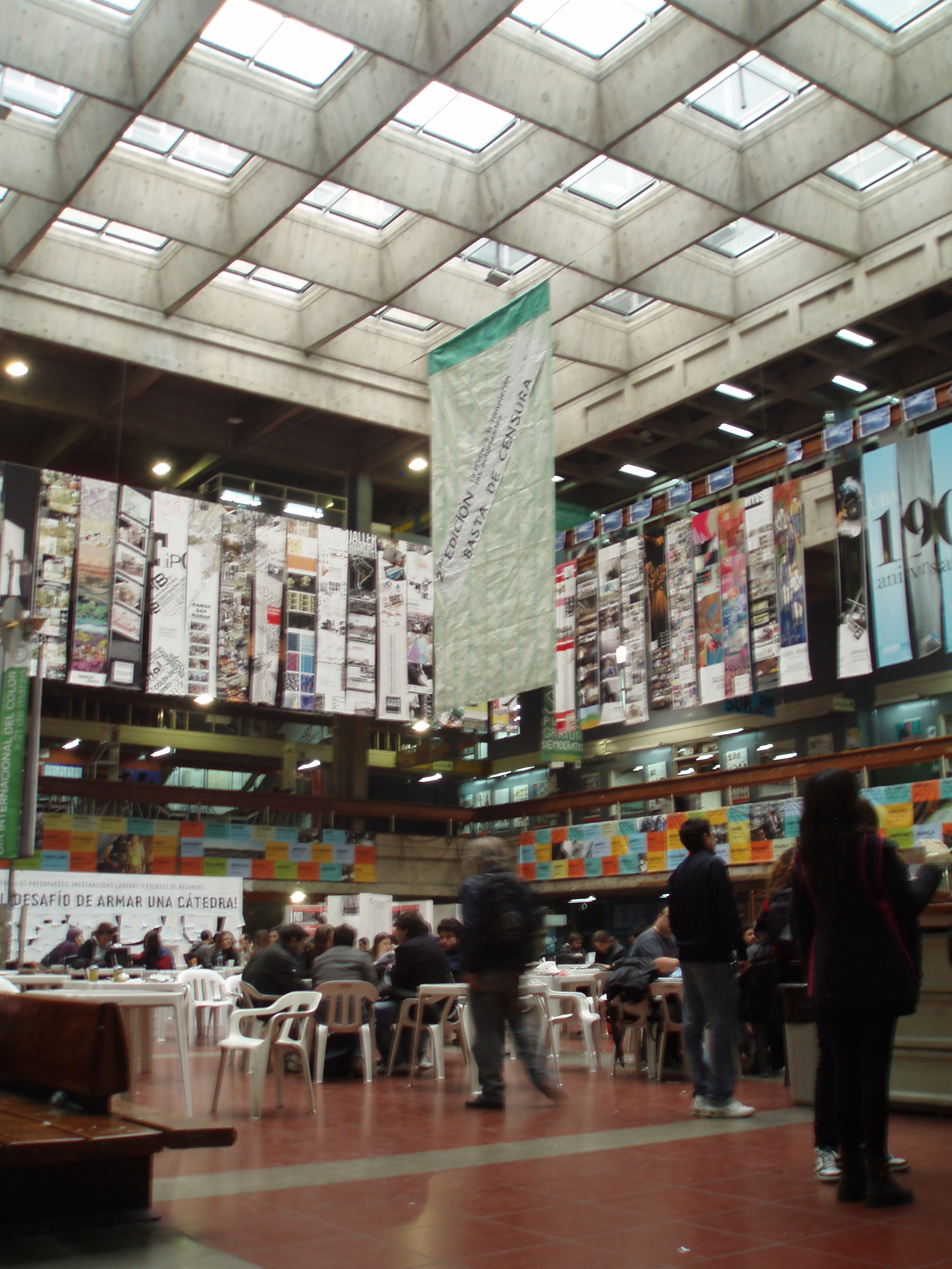 Patio central del Pabellon 3